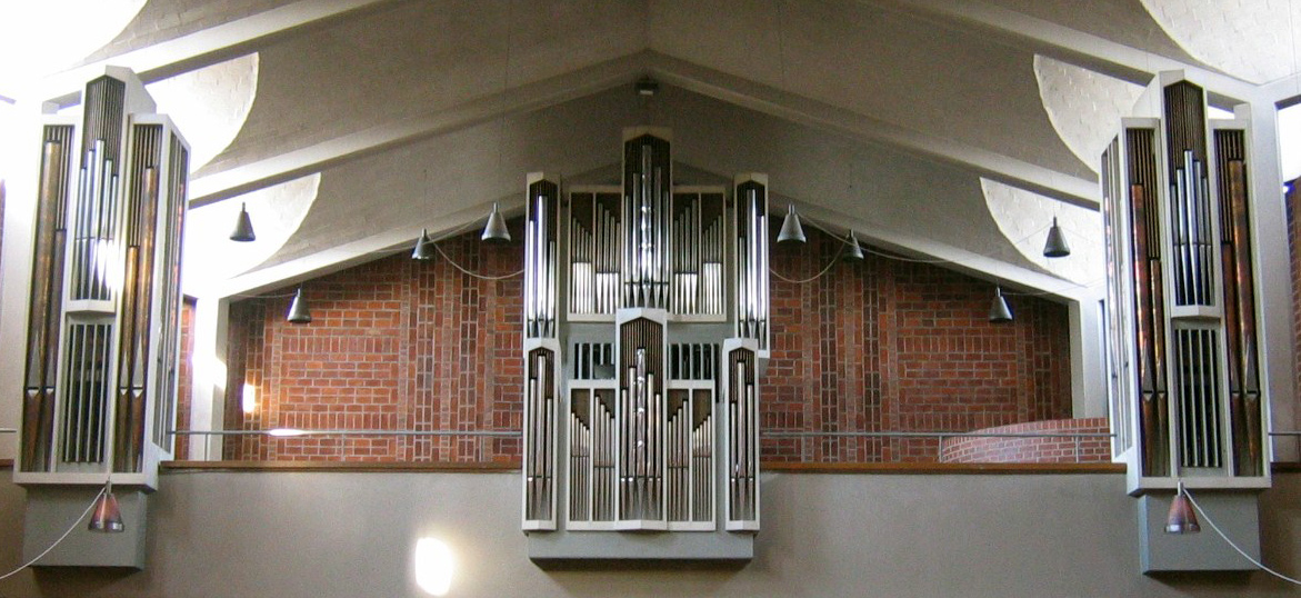 D'Haaptuergel an der Paul-Gerhardt-Kierch zu München-Laim